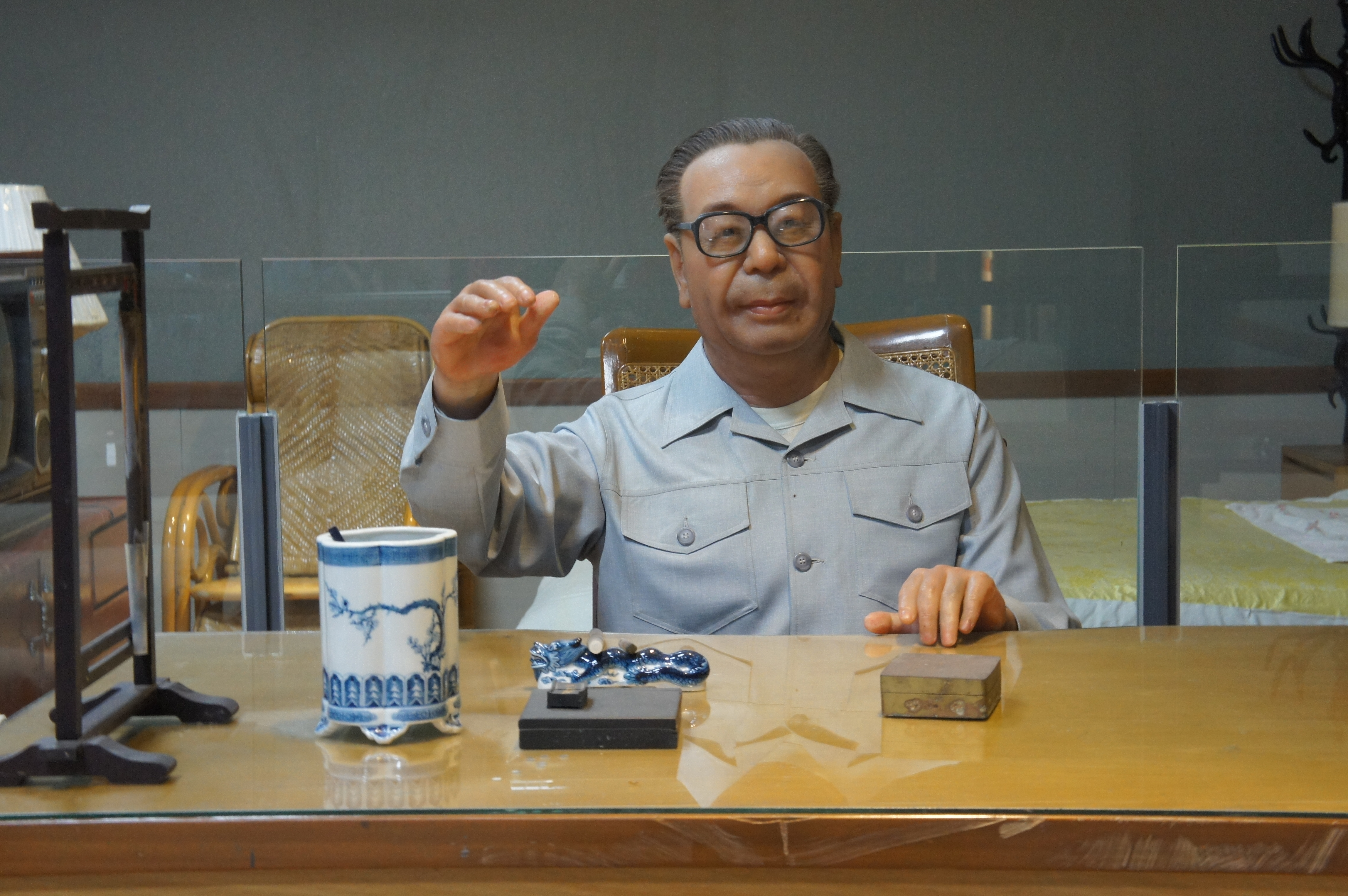 金門縣蔣經國先生紀念館展示的蔣經國蠟像。